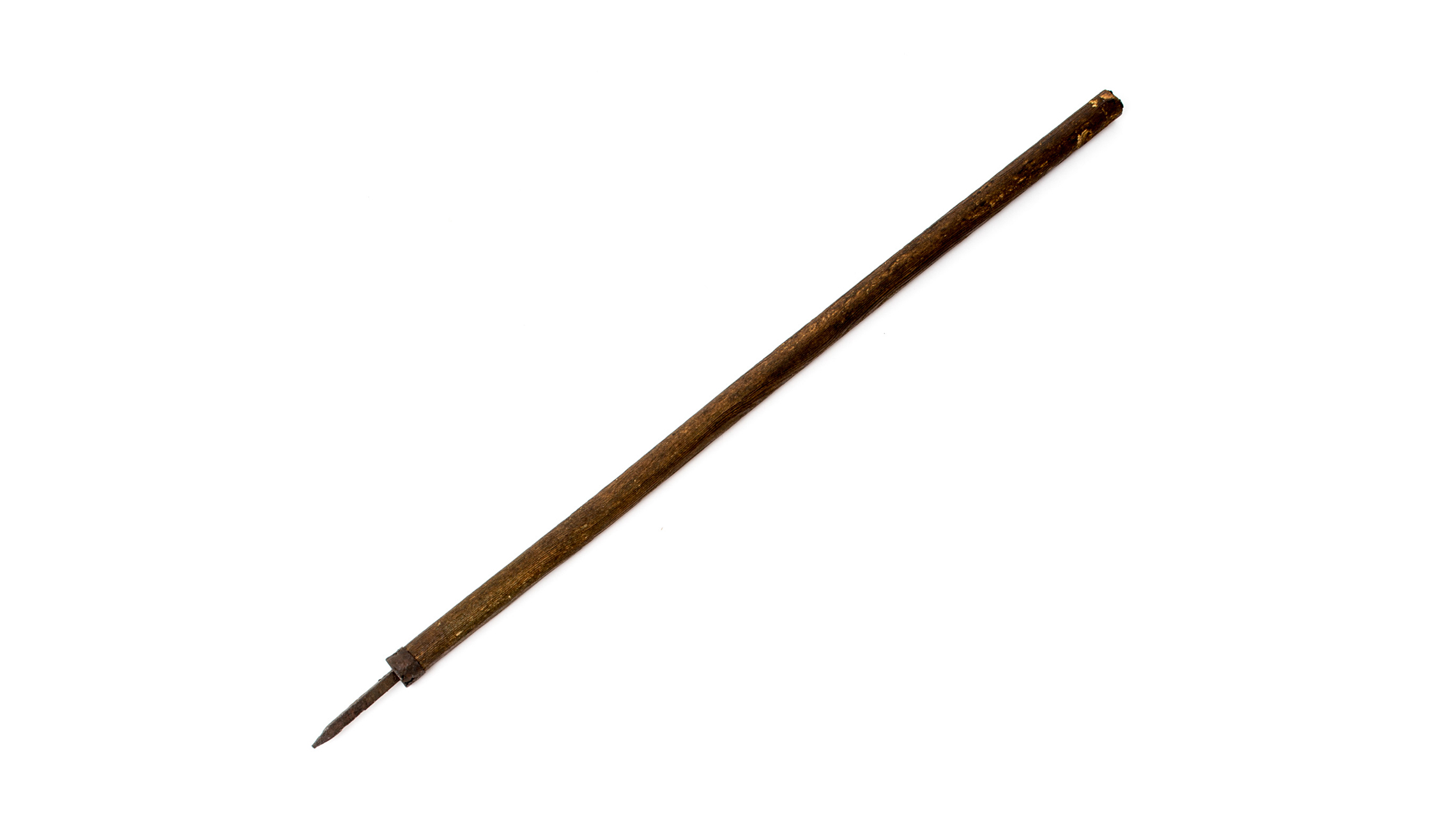 Alpenstock